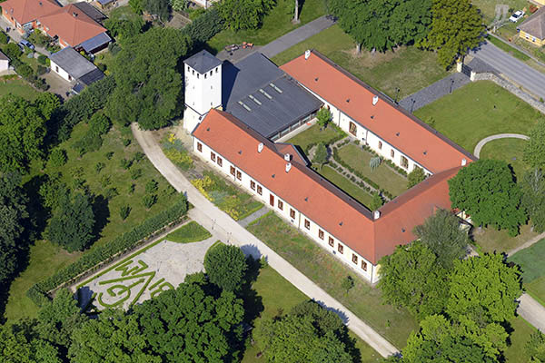 Légi fotó Vácduka